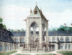 Kreuzgang Speyerer Dom, abgebrannt 1689, Ruine 1820 abgetragen